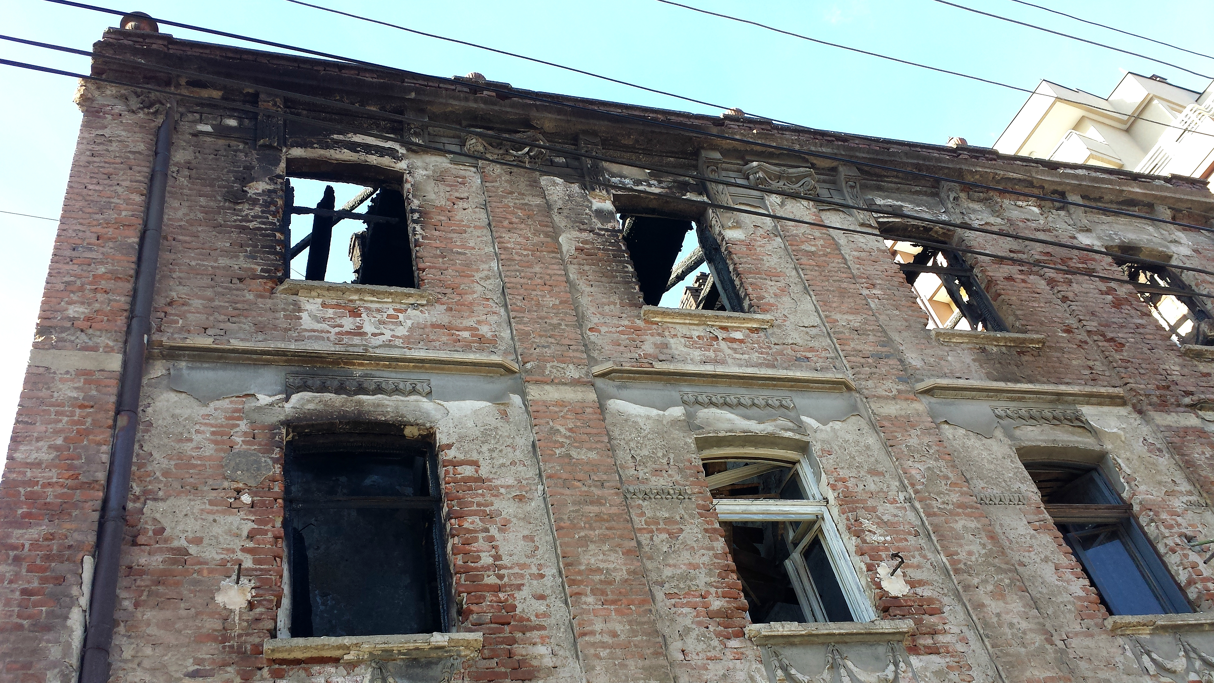 Shtëpi banimi Xhafer Deva (1930)